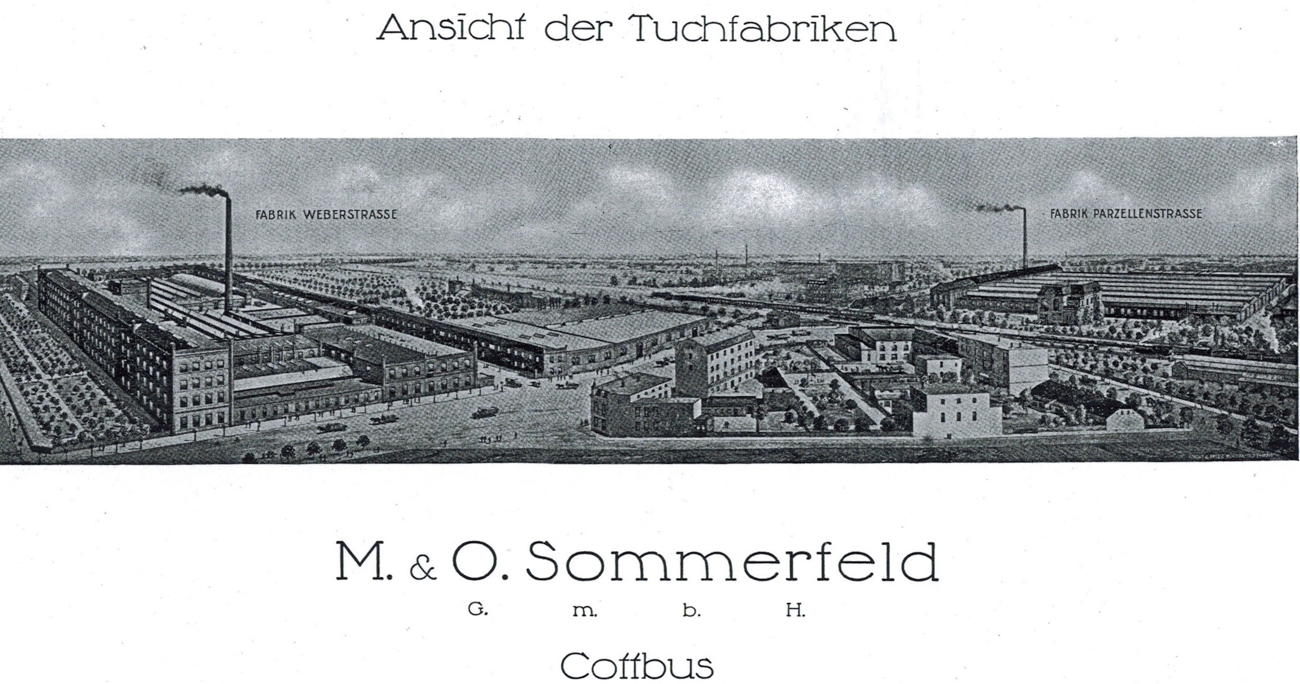 Fabrik Sommerfeld, früher